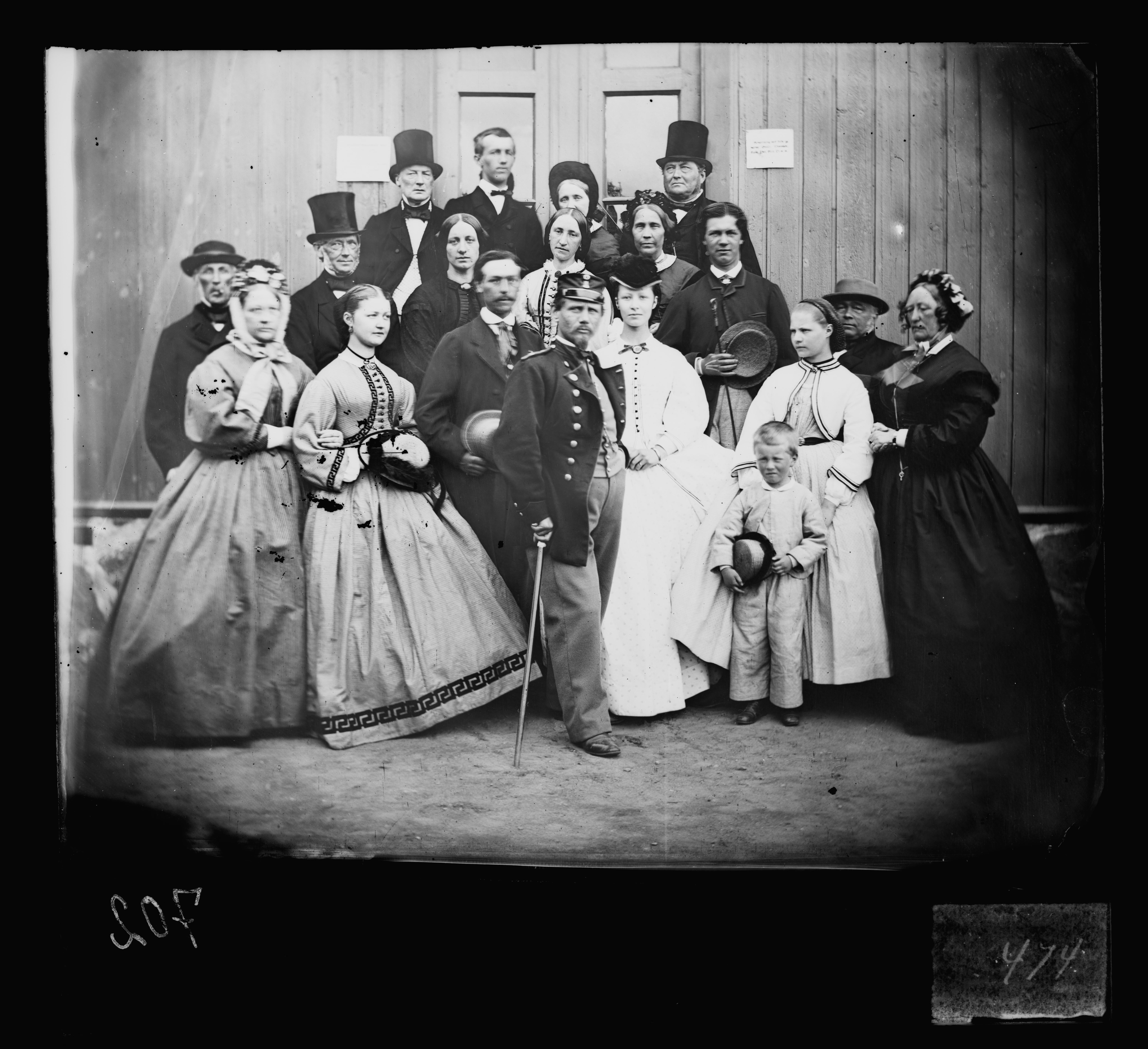 Sted: Sandefjord Kommune: Sandefjord Fylke: Vestfold Tagger